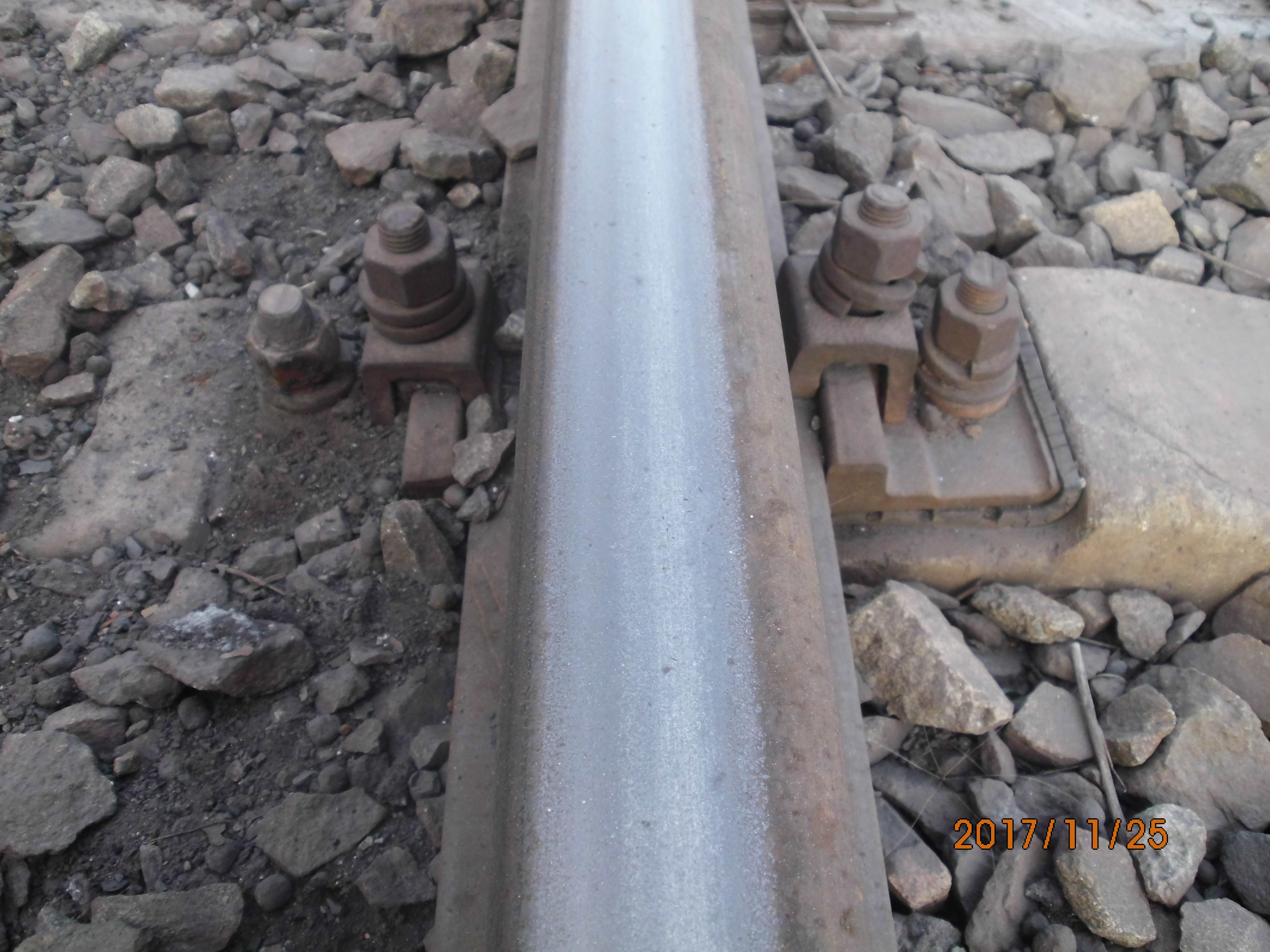 Скрепление рельсов с железобетонными шпалами закладными болтами с гайками